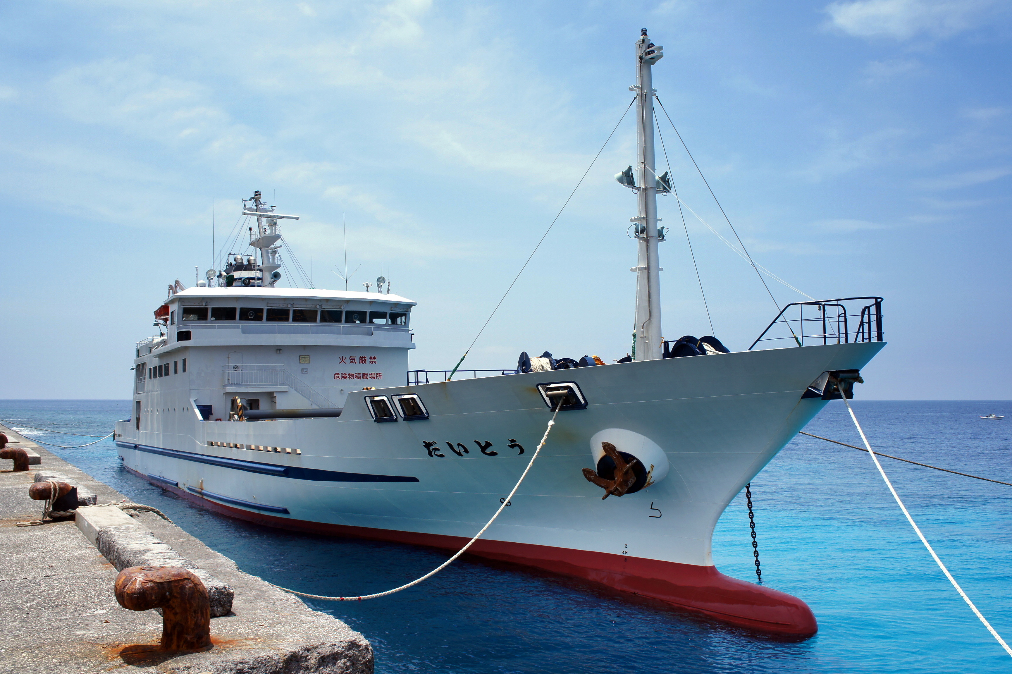 北大東島の西港に停泊する貨客船「だいとう」（2代目）。